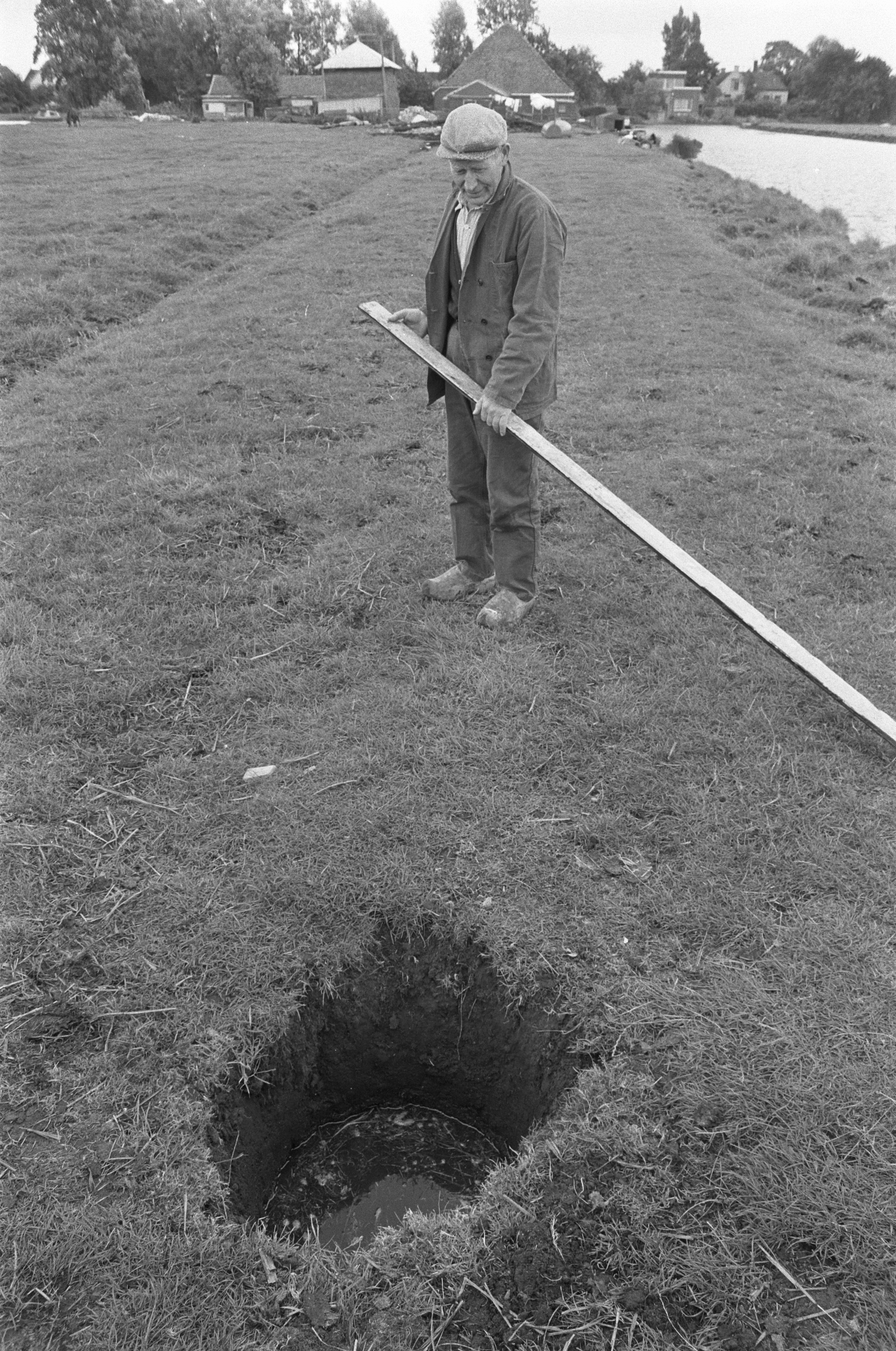 Mysterieus gat in Wormer ontdekt door de veehouder Dokter 22 augustus 1975